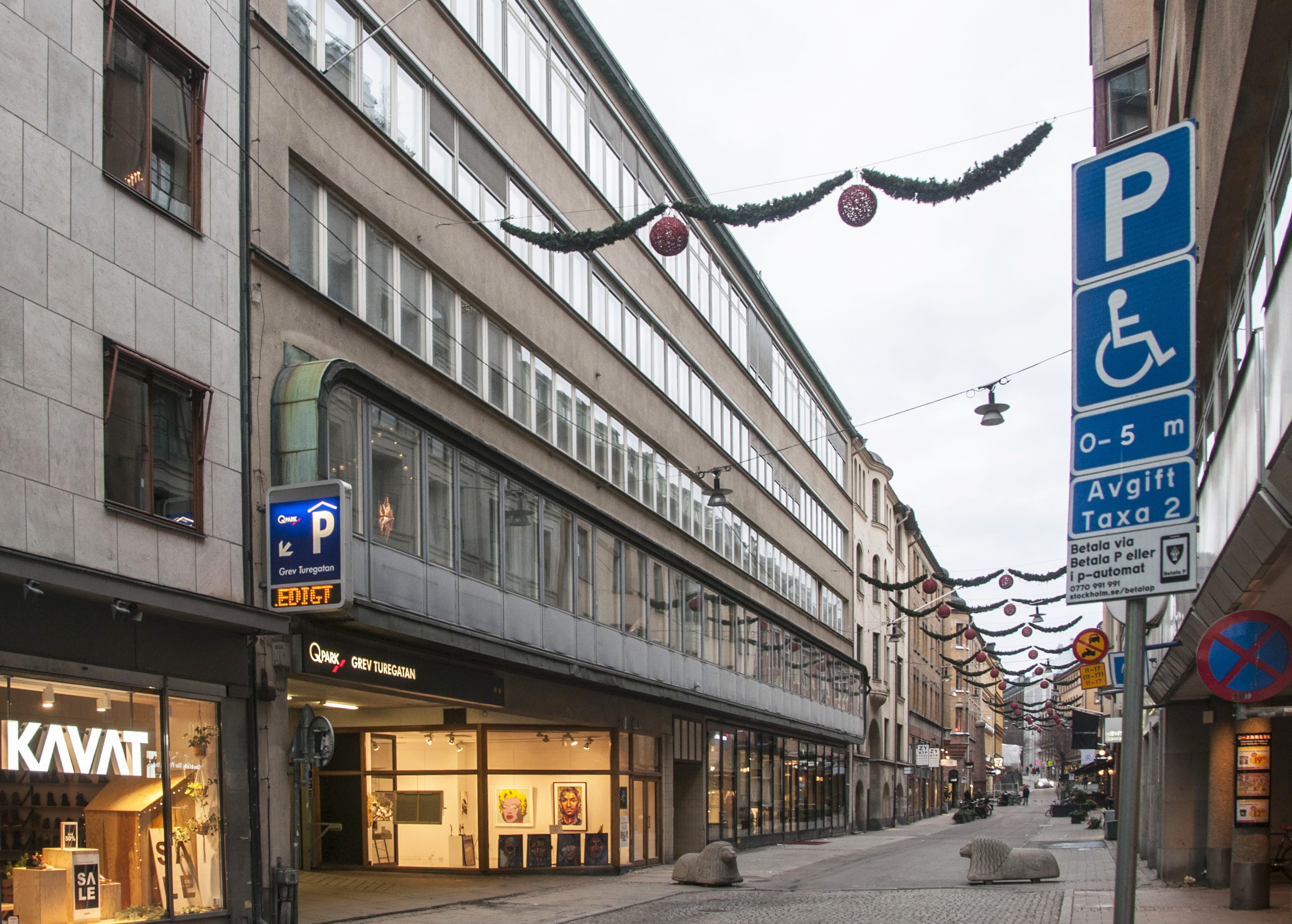 Ostemans marmorhallar, Grev Turegatan 3-5 . Byggnadsår 1939. Arkitekter Mauritz Dahlberg och Harry Egler